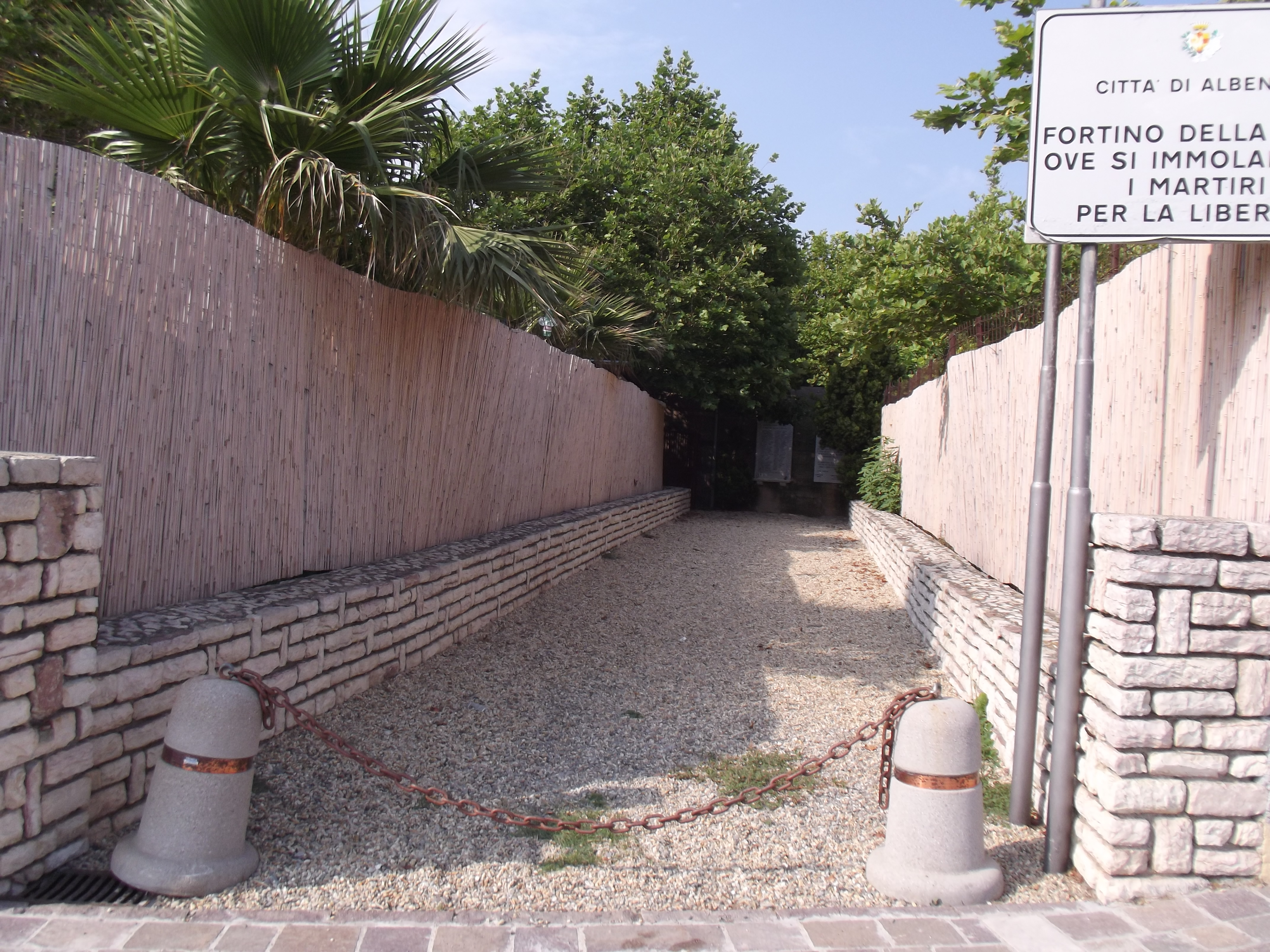 Forte risalente al secondo conflitto mondiale ove si immolarono i martiri per la libertà dal nazismo e dal fascismo